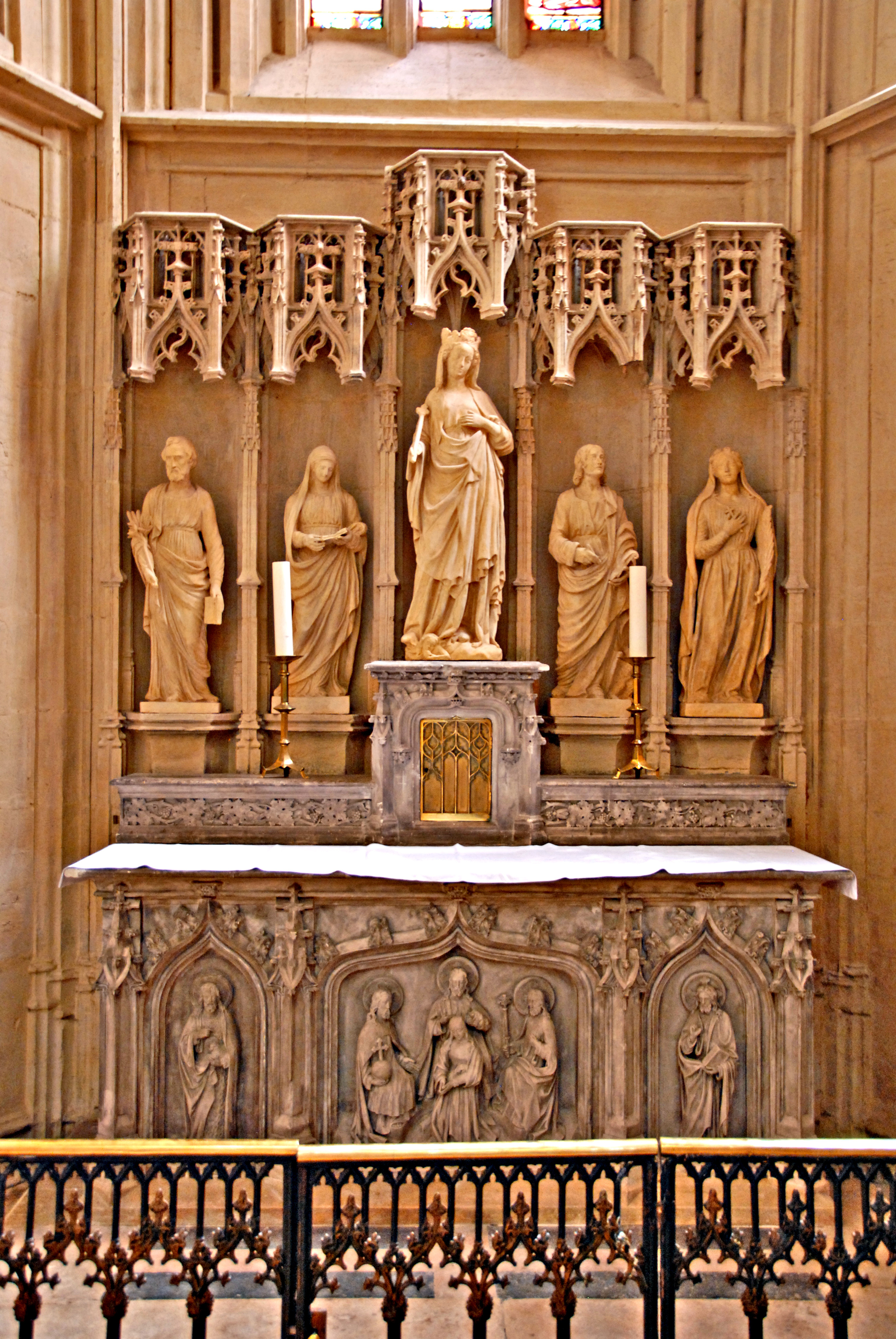 Altar in südl. Querhauskapelle